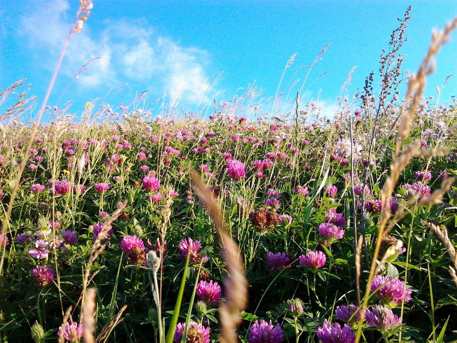 Разнотравье у села Нижняя Добринка Жирновского района